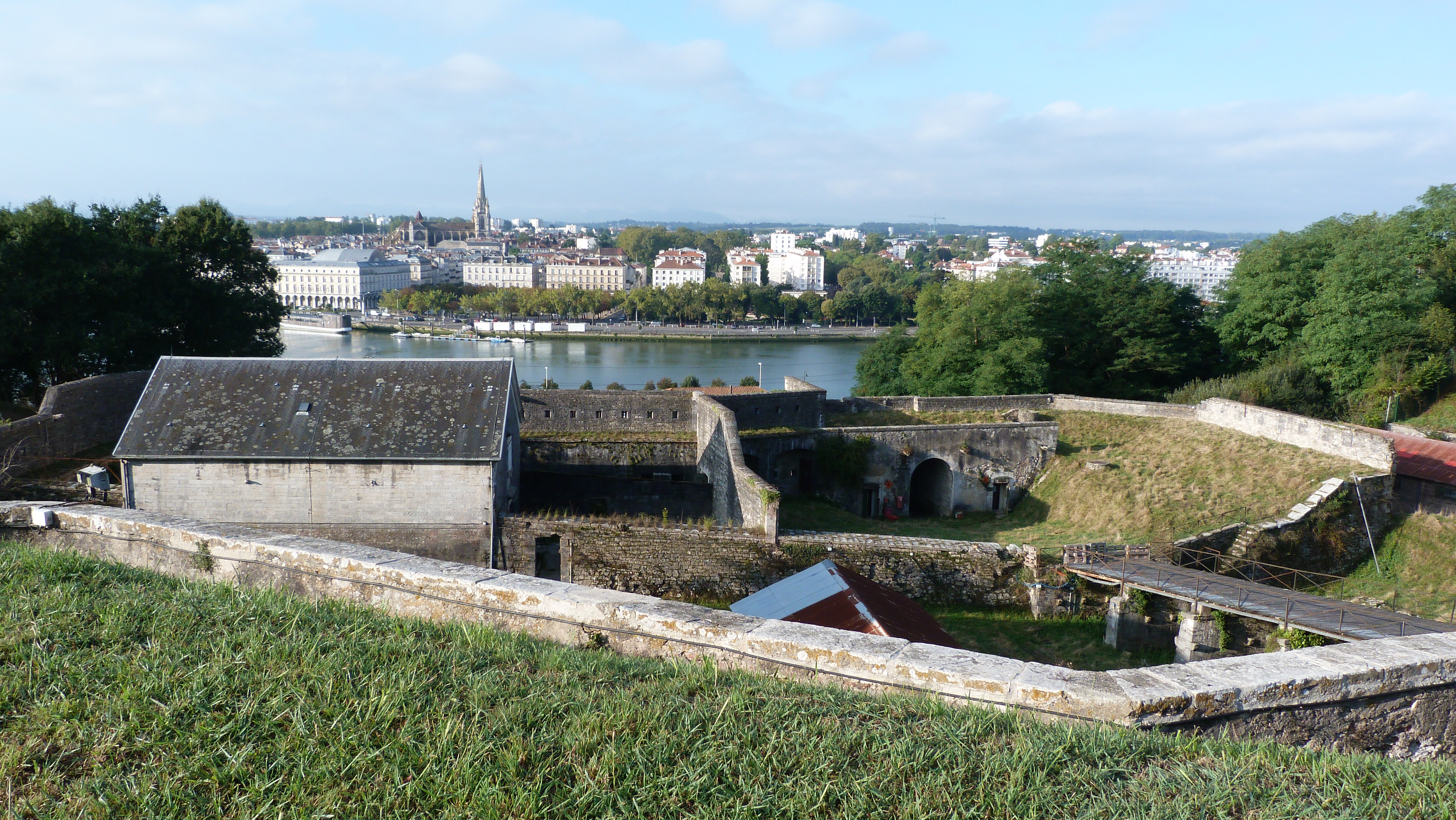 Bayonne citadelle porte royale Citadelle de Bayonne (Inscrit) .